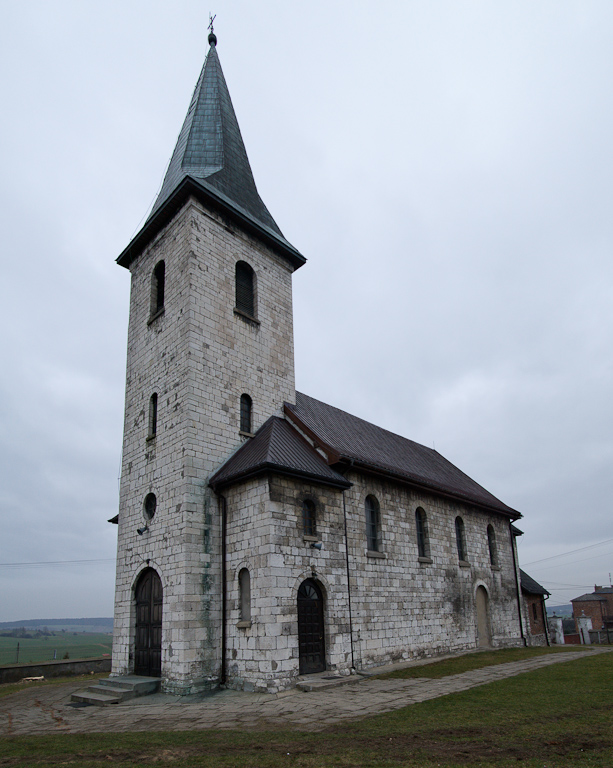 Kościół św. Jakuba Apostoła w Gieble, widok zewnętrzny.